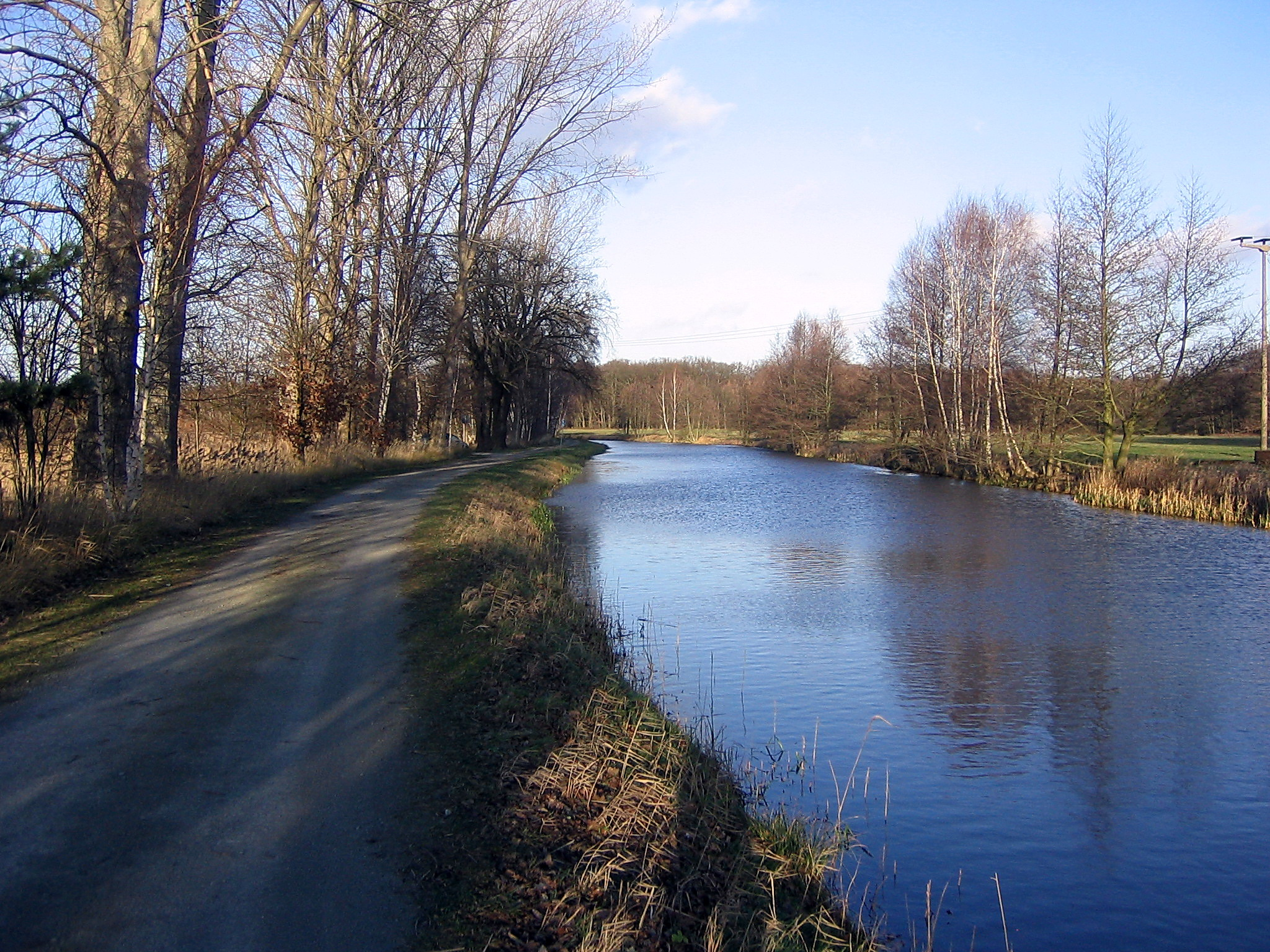 Die Ohre bei Calvörde, Bild aufgenommen am 14.01.2007 durch Geisterbob